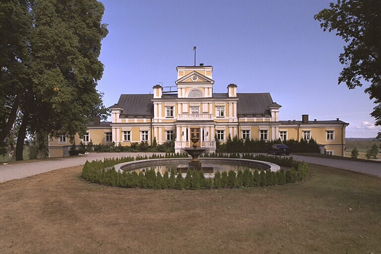 Motiv: Dagsnäs herrgård Nyckelord: Byggnadsminnen Kategori: HerrgårdDagsnäs herrgård